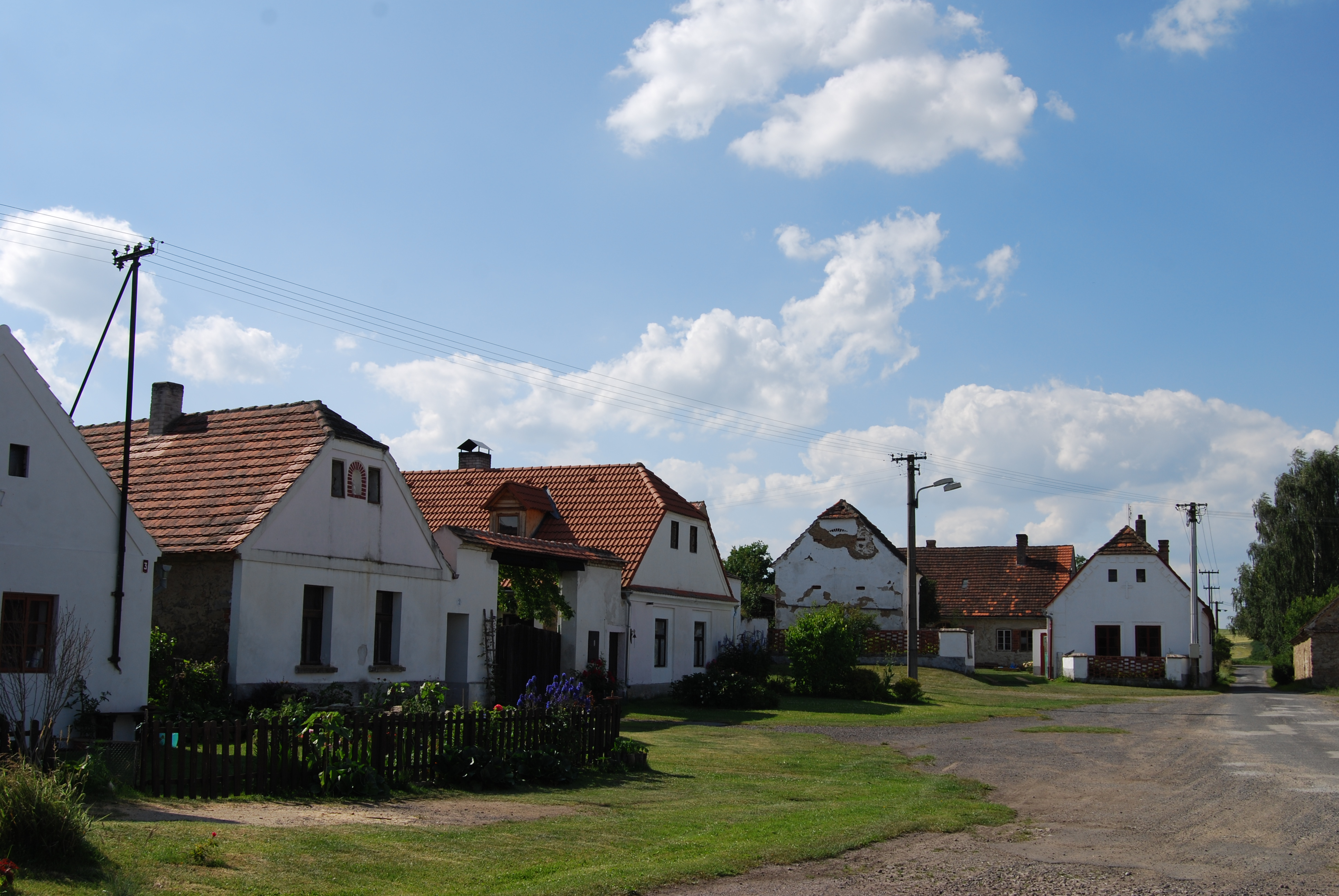 Pohled na část obce. Bořice je část města Mirotice v okrese Písek. Česká republika.